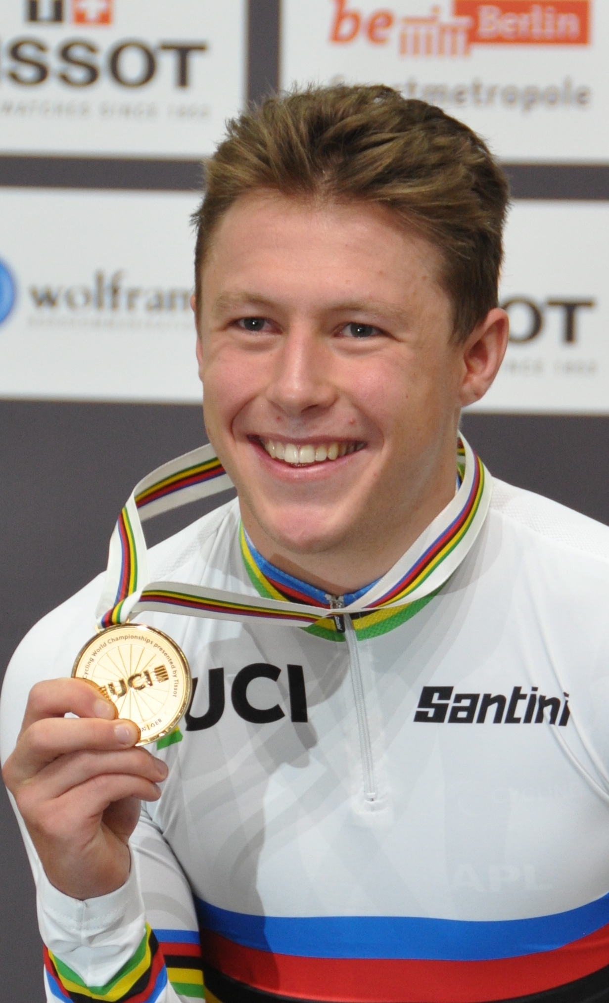 Corbin Strong, Radsportler aus Neuseeland - Weltmeister 2020 im Punktefahren